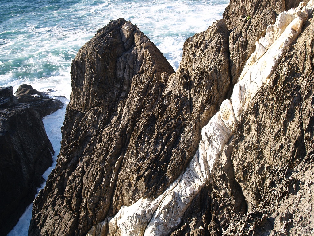 A vea de seixo vista dende o cantil.